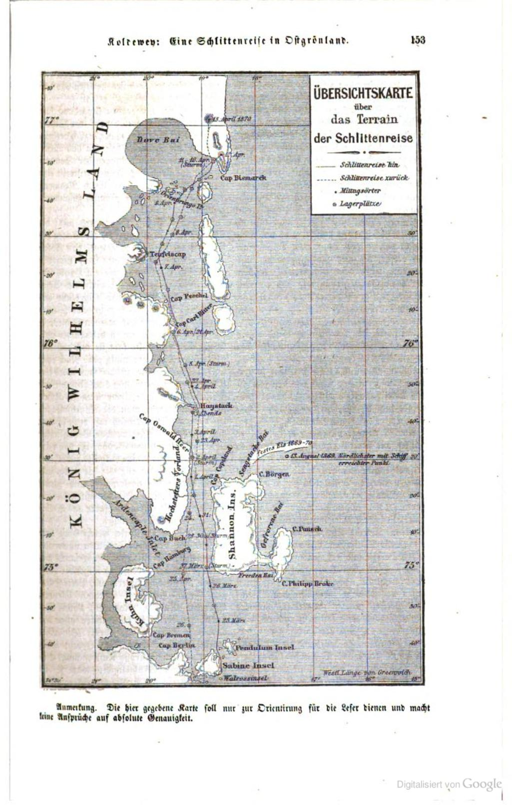 Karte der Ostgrönlandexpedion von Carl Koldewey